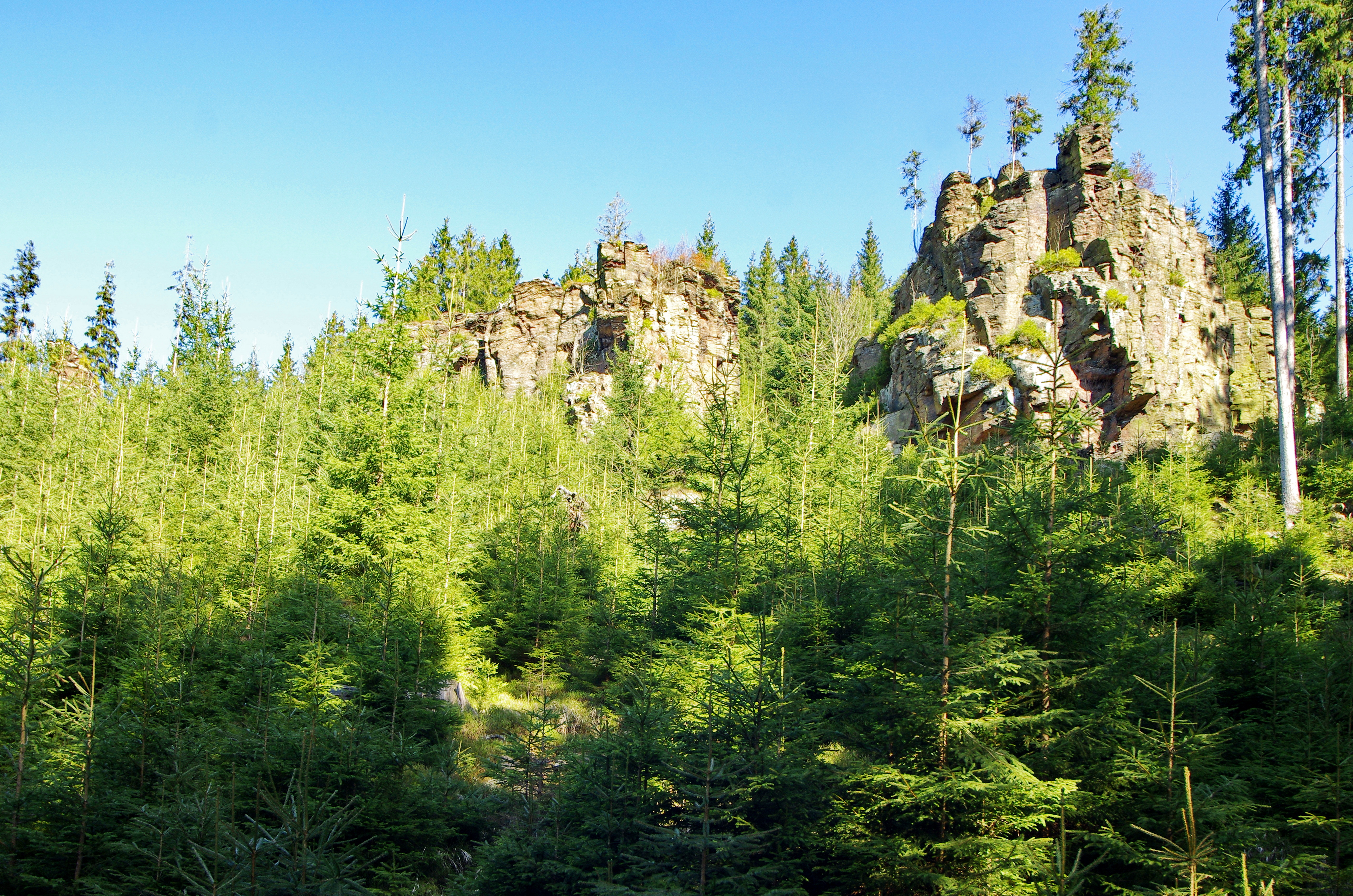 Holubí skály (též označované jako Holubí skalky) v Přírodním parku Zlatý kopec, okres Karlovy Vary